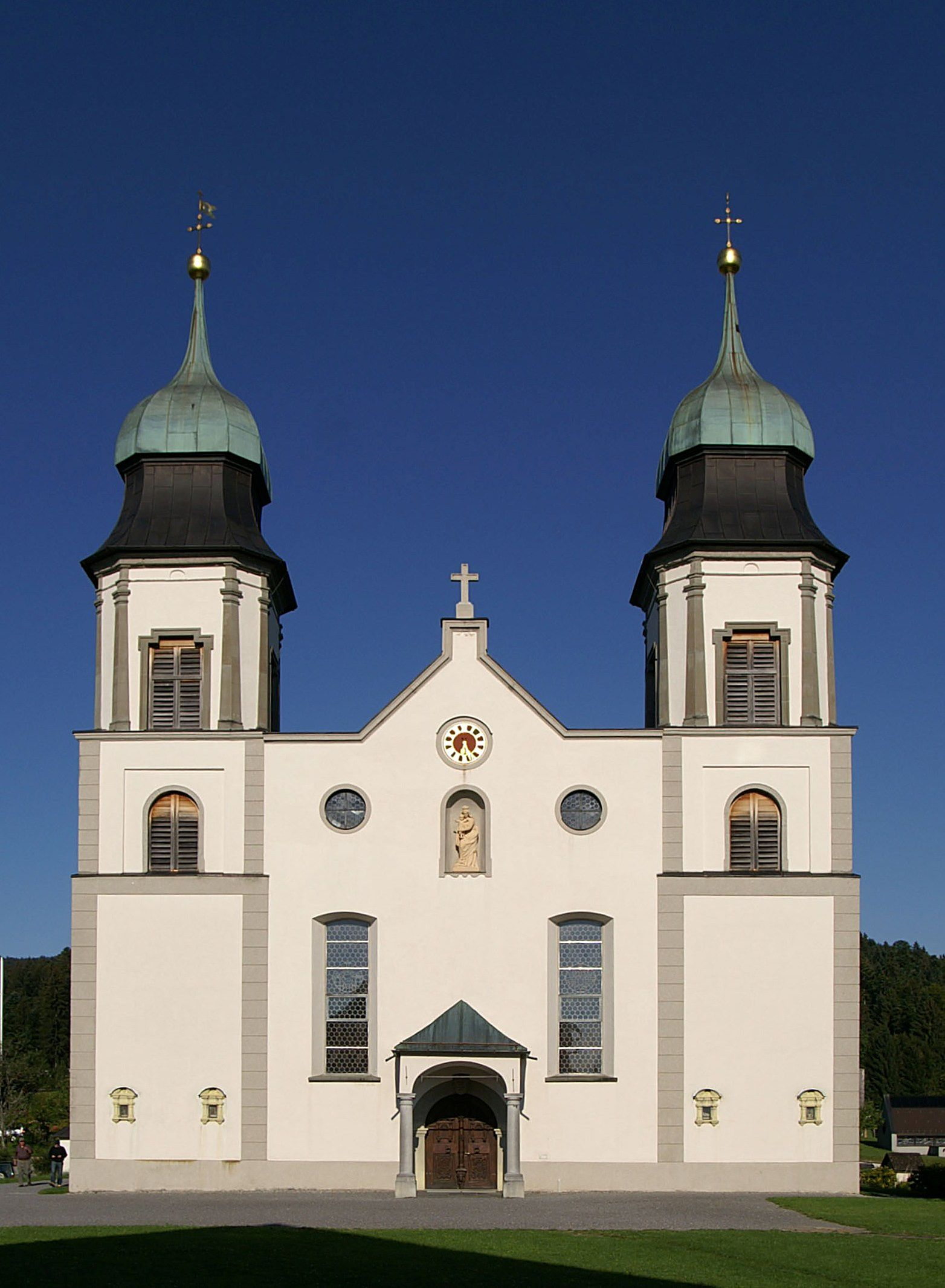 Bildstein, Wallfahrtskirche Mariä Heimsuchung. *** Veröffentlicht: Alois Niederstätter in "Geschichte Vorarlbergs Band 2 Vorarlberg 1523 bis 1861 Auf dem Weg zum Land ISBN 978-3-7030-0864-1 2015 (ohne Quellenangabe).